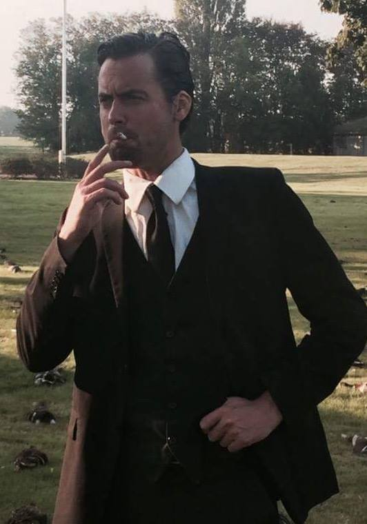 Mads Holger ved et jagtselskab i 2014, Jylland.